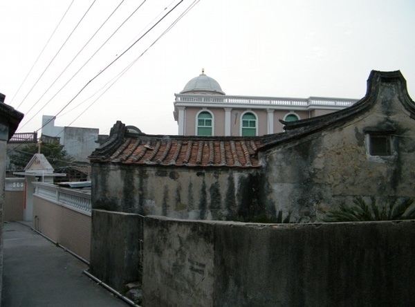 澳头天主堂